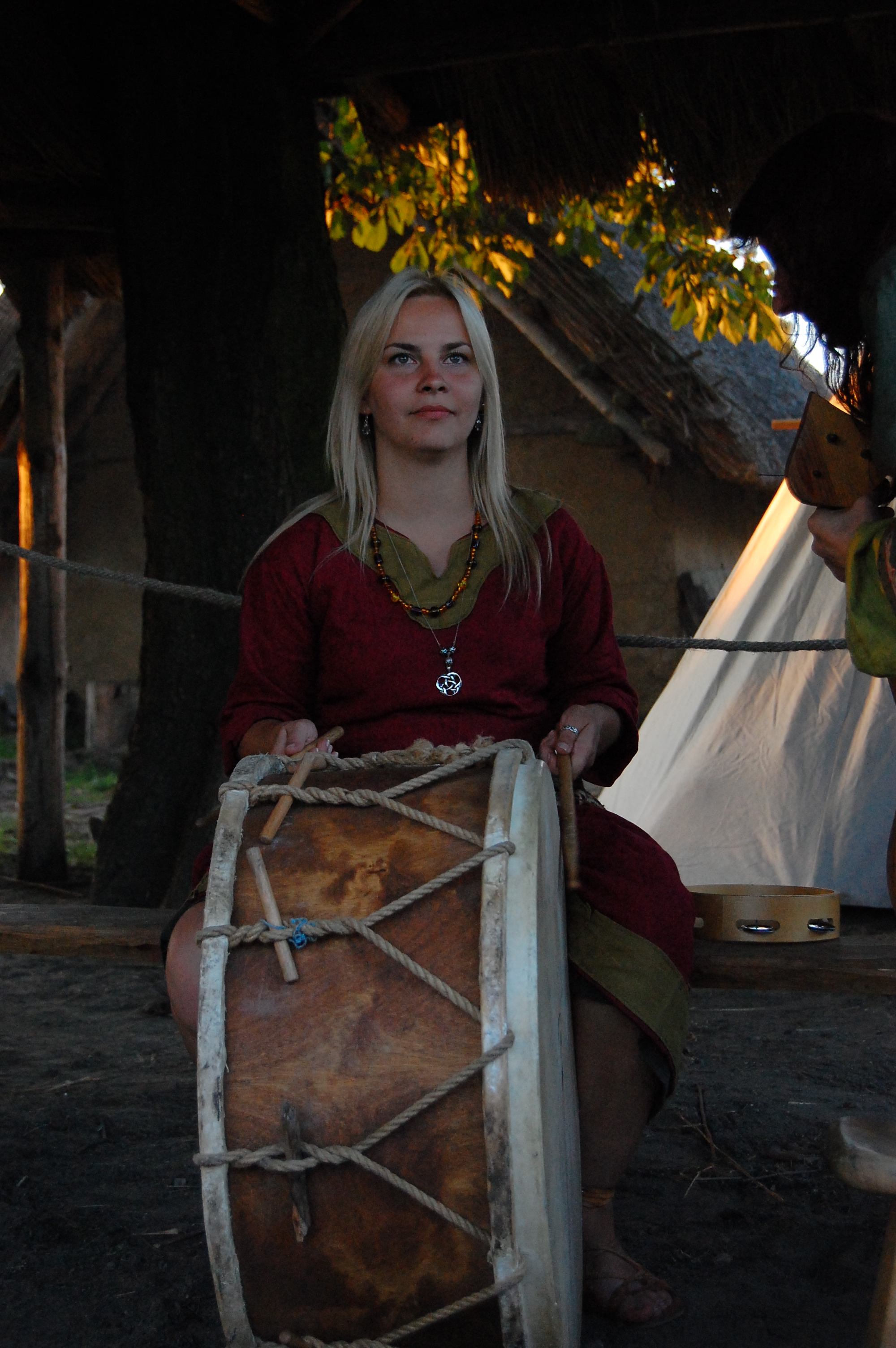 Joanna Lacher z grupy muzycznej Percival w skansenie w Wolinie.